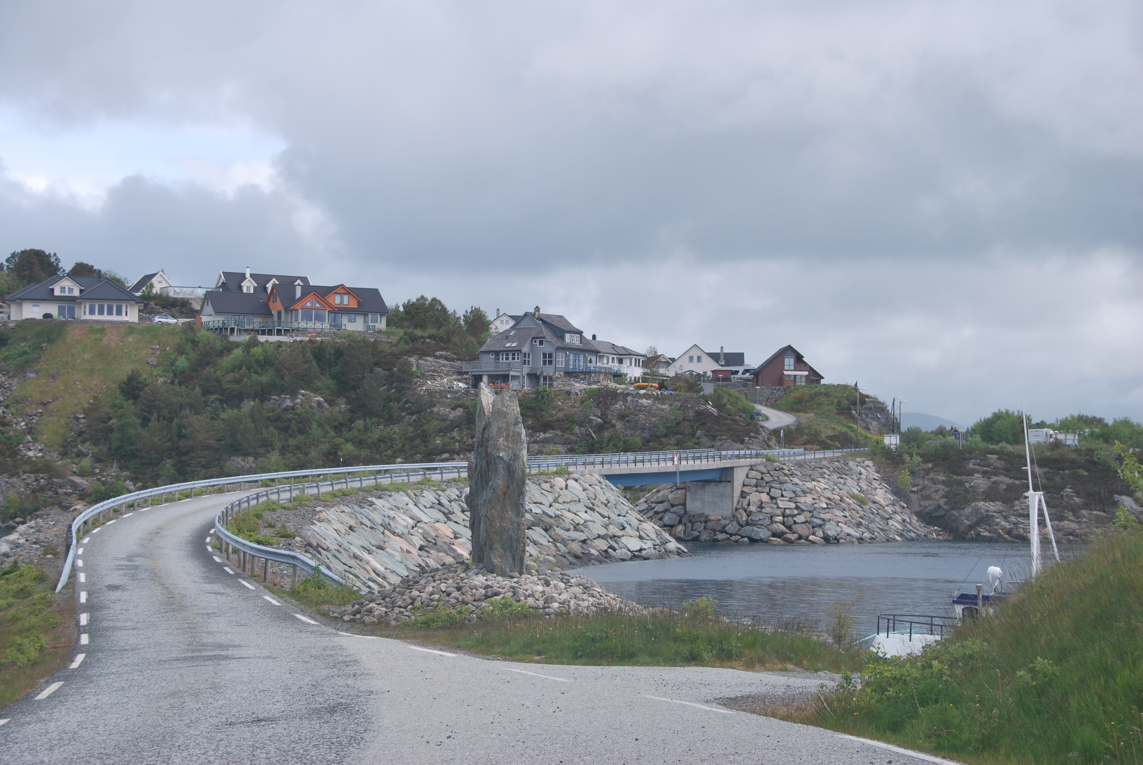 Tyssøybrua på Tyssøy.